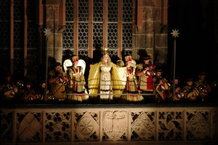 Eröffnungsprolog des Nürnberger Christkindlesmarktes 2009 durch das Nürnberger Christkind Johanna Heller.